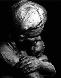 Mutter umarmt Kind - Bild einer Skulptur